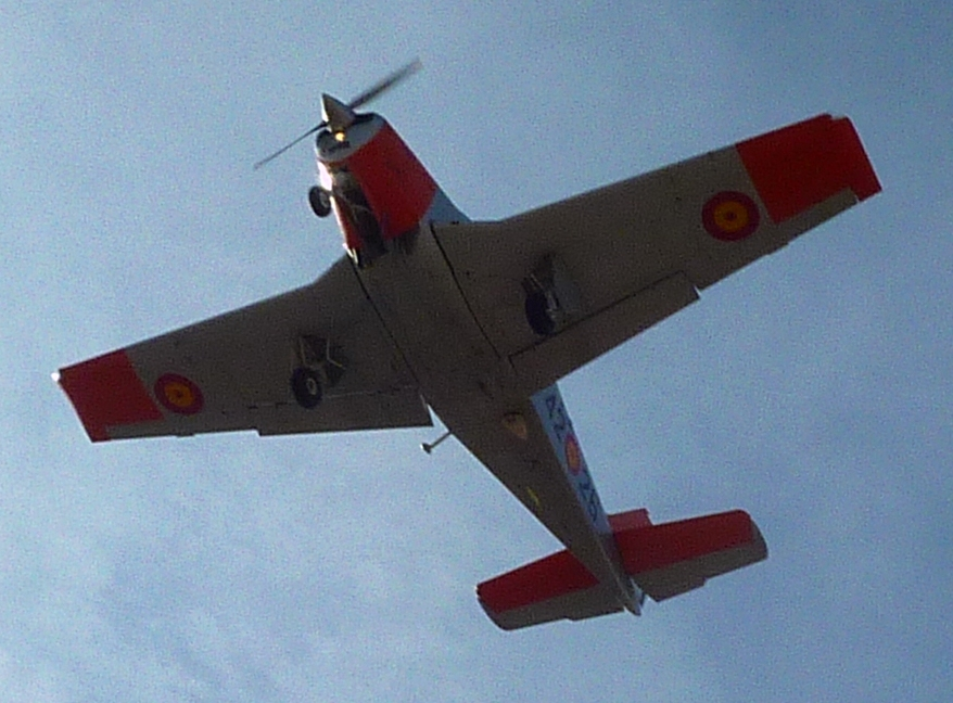 Beech Bonanza del Ejército del Aire Español.